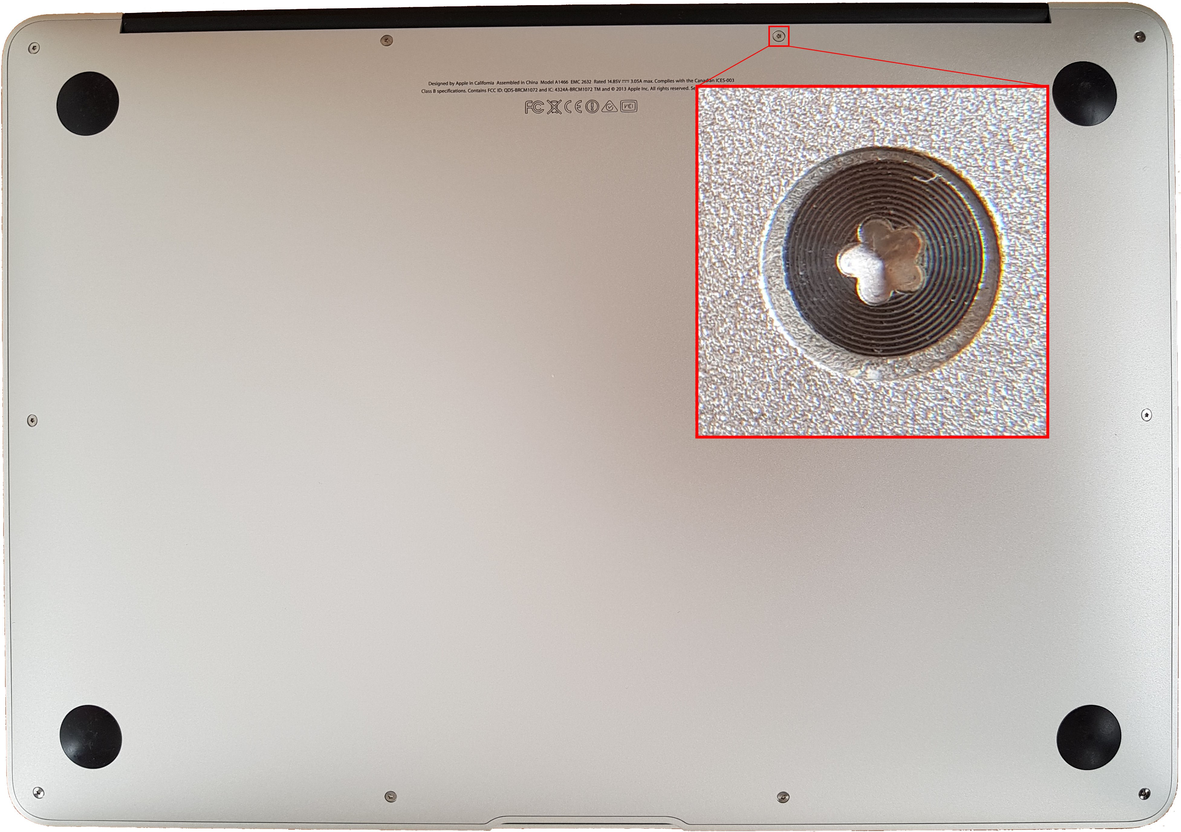 Fotografía de los diez tornillos exteriores (pentalobulares) de un MacBook Air de 2013 modelo A1466